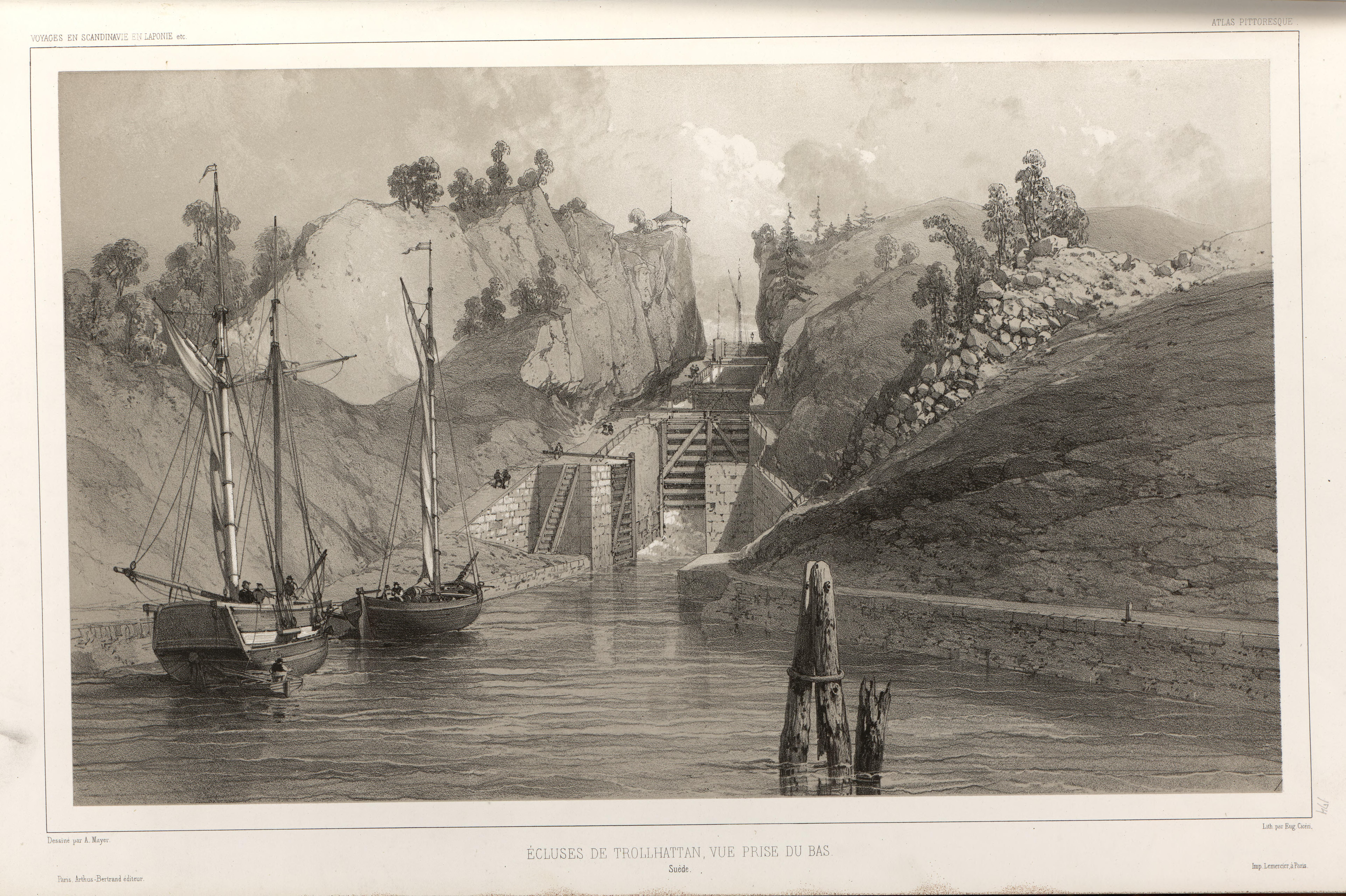 Illustrasjon hentet fra boken "Voyages de la Commission scientifique du Nord, en Scandinavie, en Laponie, au Spitzberg et aux Feröe" av ukjent forfatter og utgitt av Arthus BertrandParis : Arthus Bertrand, [1852] (Paris, [1852])